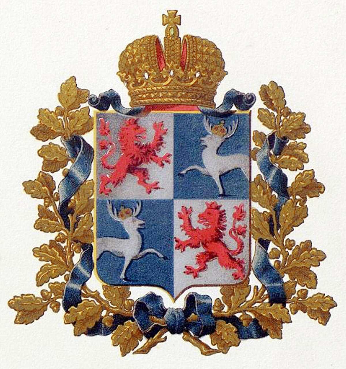 Official Russian Empire coat of arms Kurlandia Governorate. Герб Российской Империи Курляндской губернии в Гербовнике МВД. Утверждён Императором Всероссийским Александром Вторым.